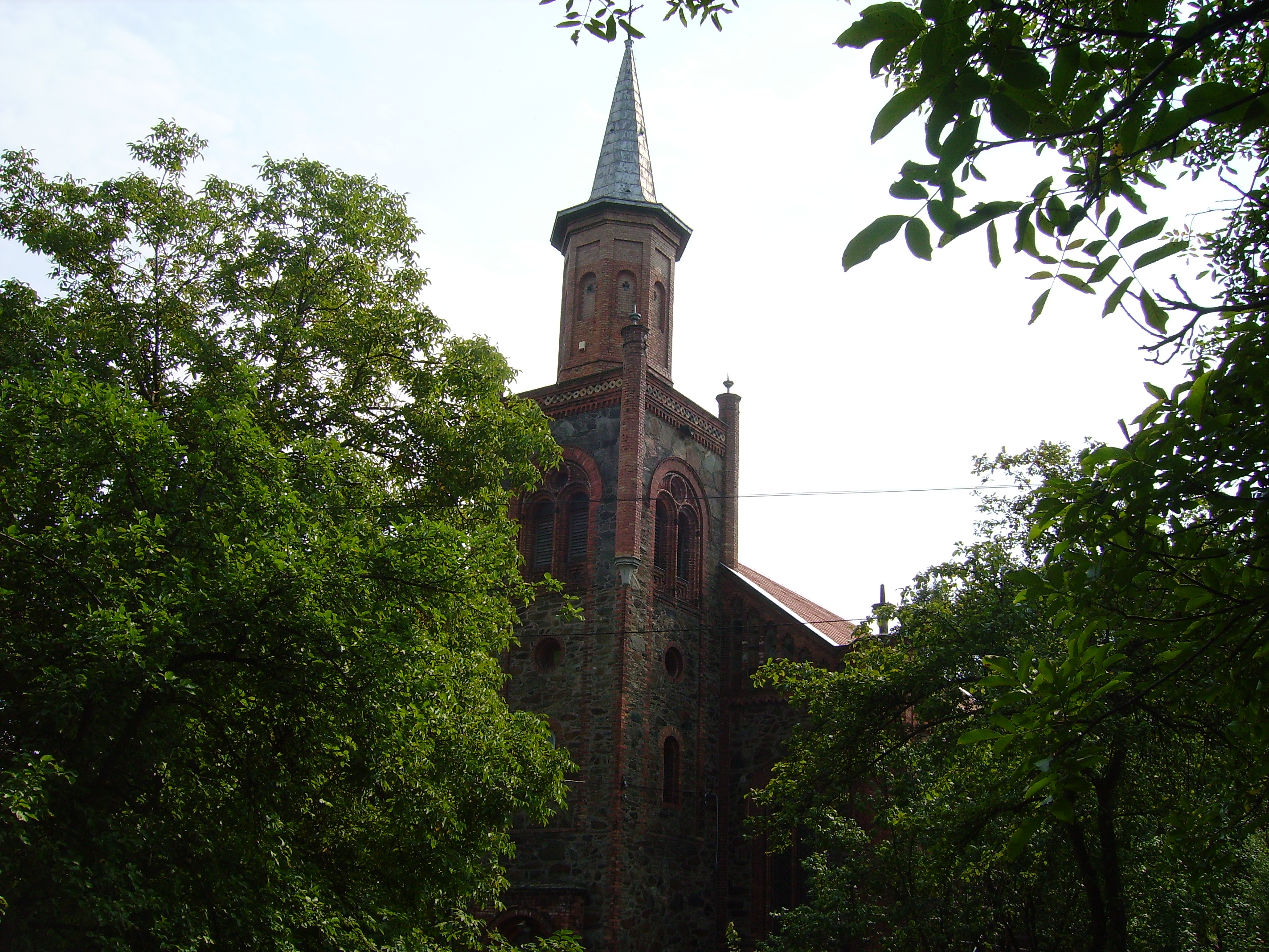 Leśna, kościół par. p.w. św. Jana Chrzciciela, 1848-1854